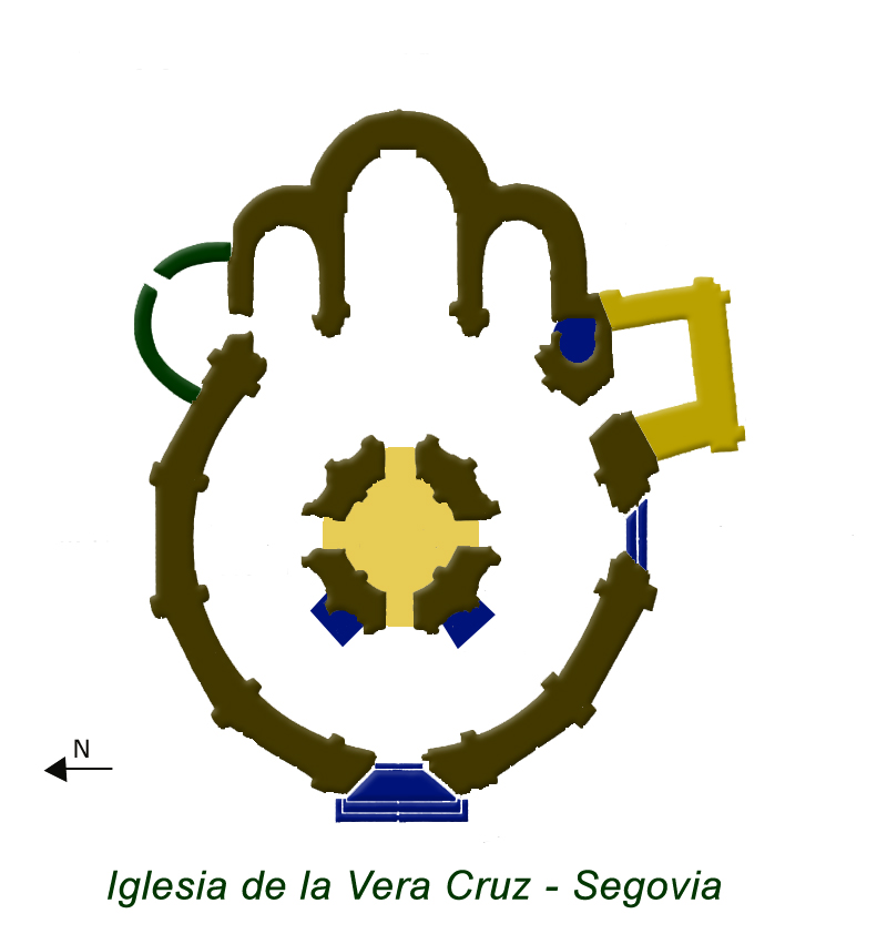 La iglesia de la Vera Cruz, anteriormente titulada del Santo sepulcro, es un templo católico situado en el barrio de San Marcos de la ciudad de Segovia, Castilla y León (España). Se ubica al norte de la ciudad, en la ladera que asciende hasta Zamarramala de la que fue, durante siglo, iglesia parroquial.